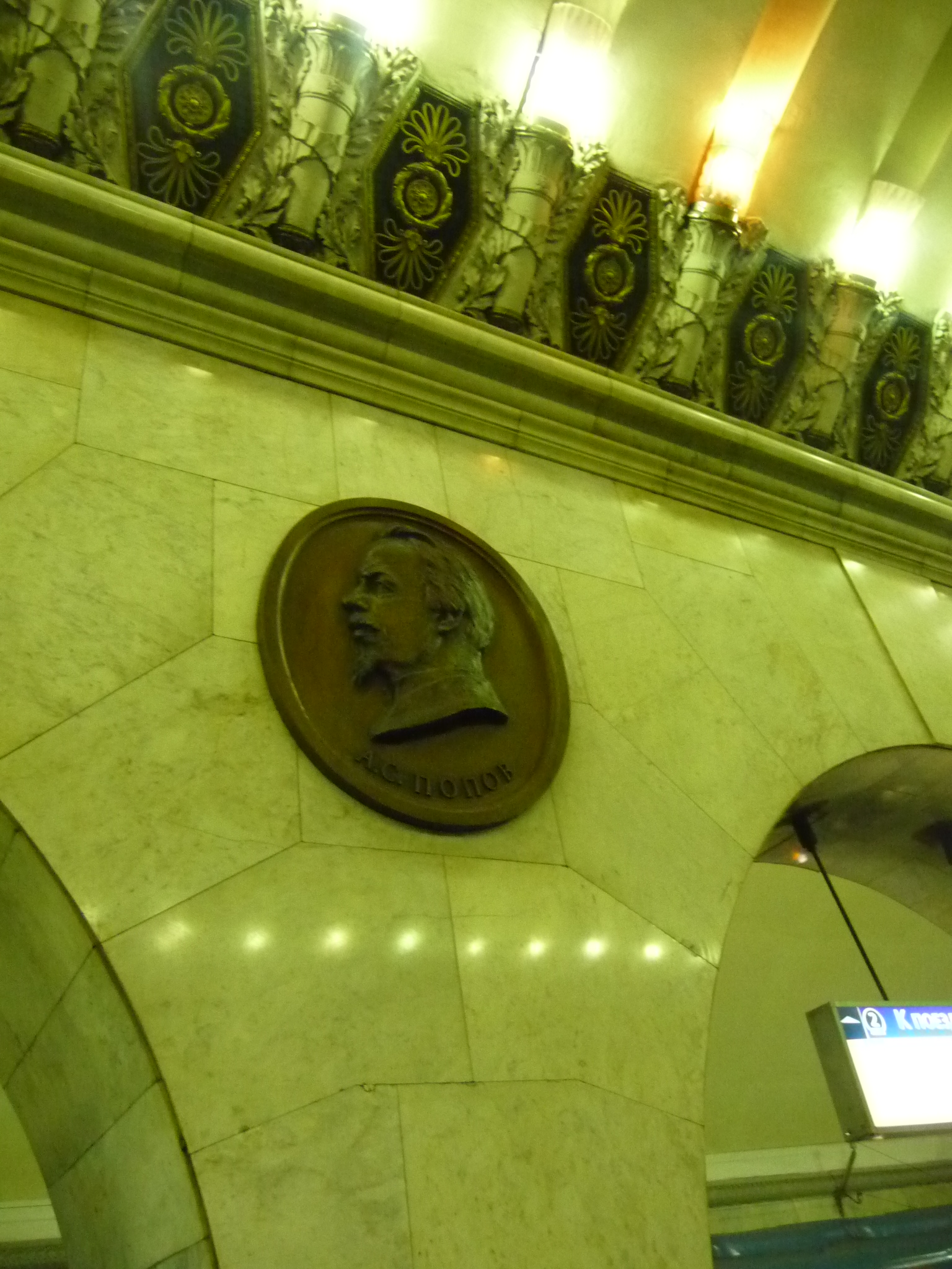 Metro-PopovMonument-p1030510.jpg